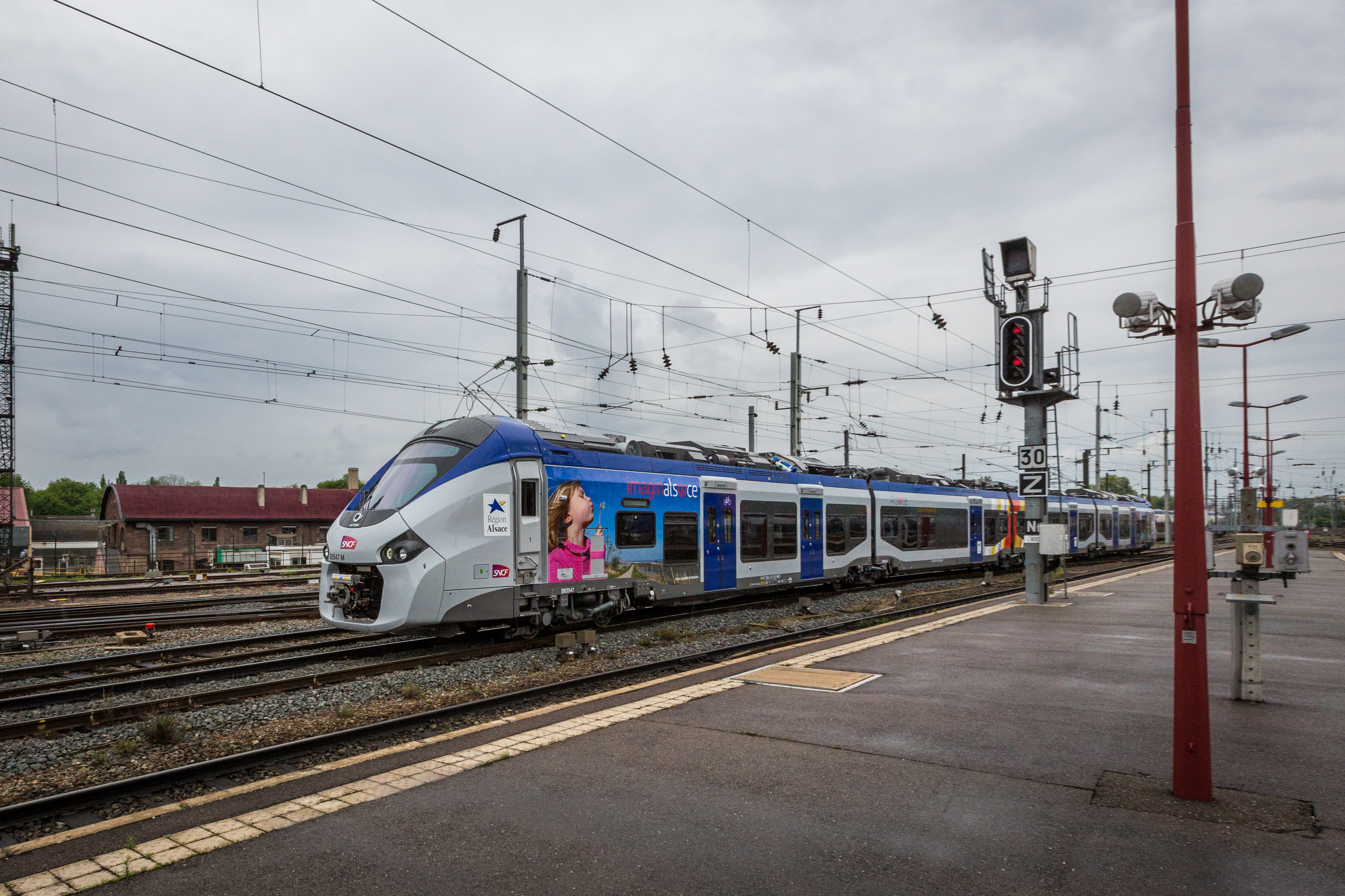 Le premier train Régiolis SNCF Région Alsace 83547M en service commercial dans la région Alsace, TER 830910 Strasbourg-Sarreguemines 28 avril 2014.